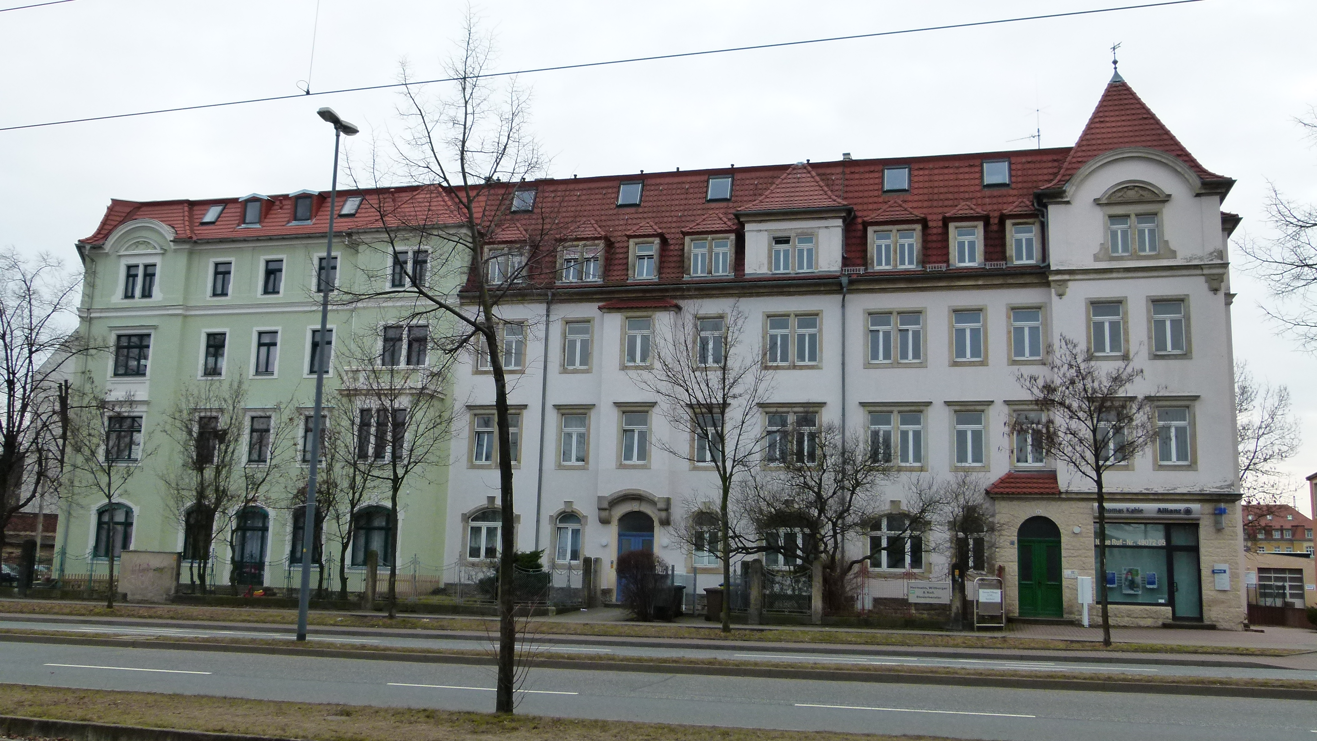 Denkmalgeschütztes Gebäude, Fröbelstraße 47-49, Friedrichstadt, Dresden